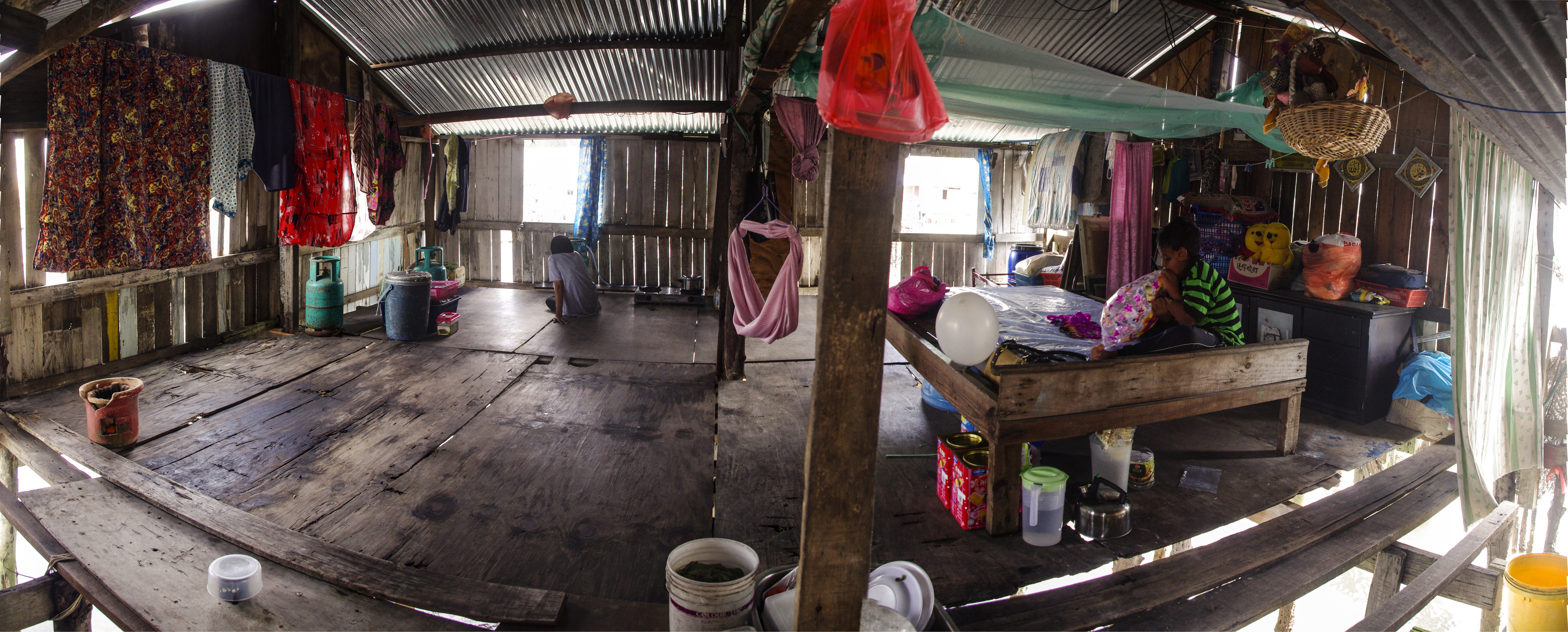 orang seletar